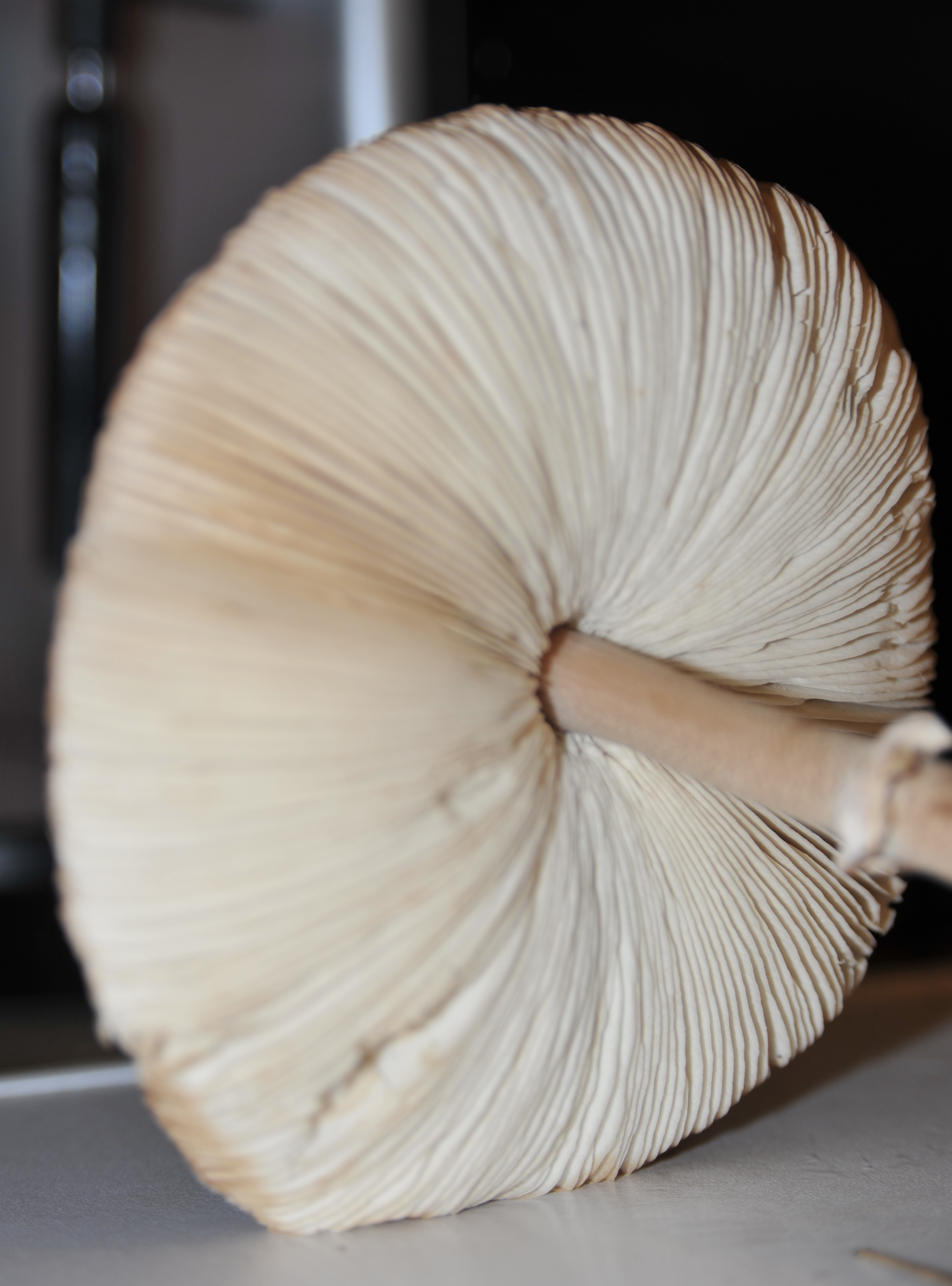 Lépiote mamelonnée (Macrolepiota mastoidea)